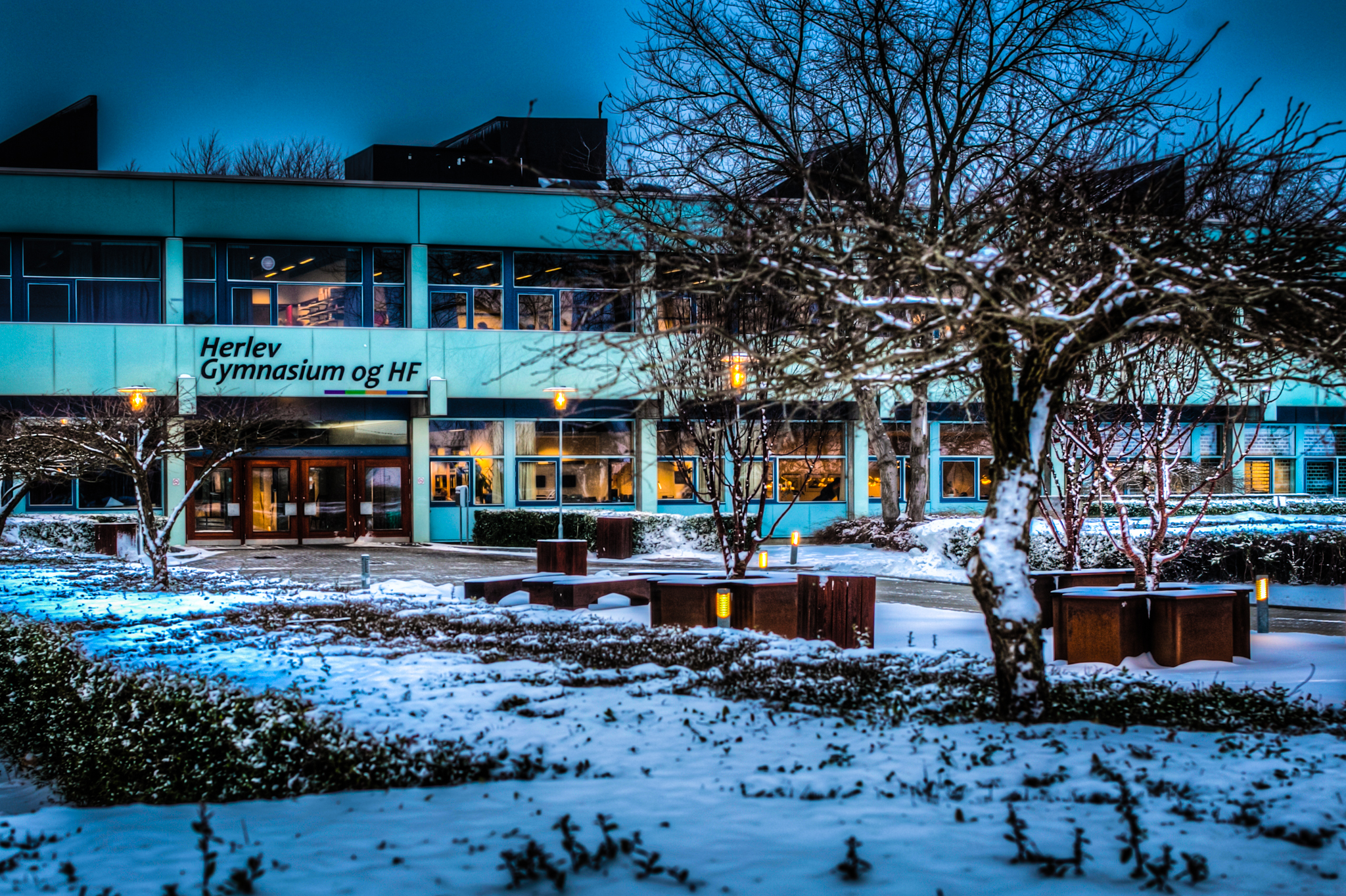 Herlev Gymnasium og HF ved vintertid